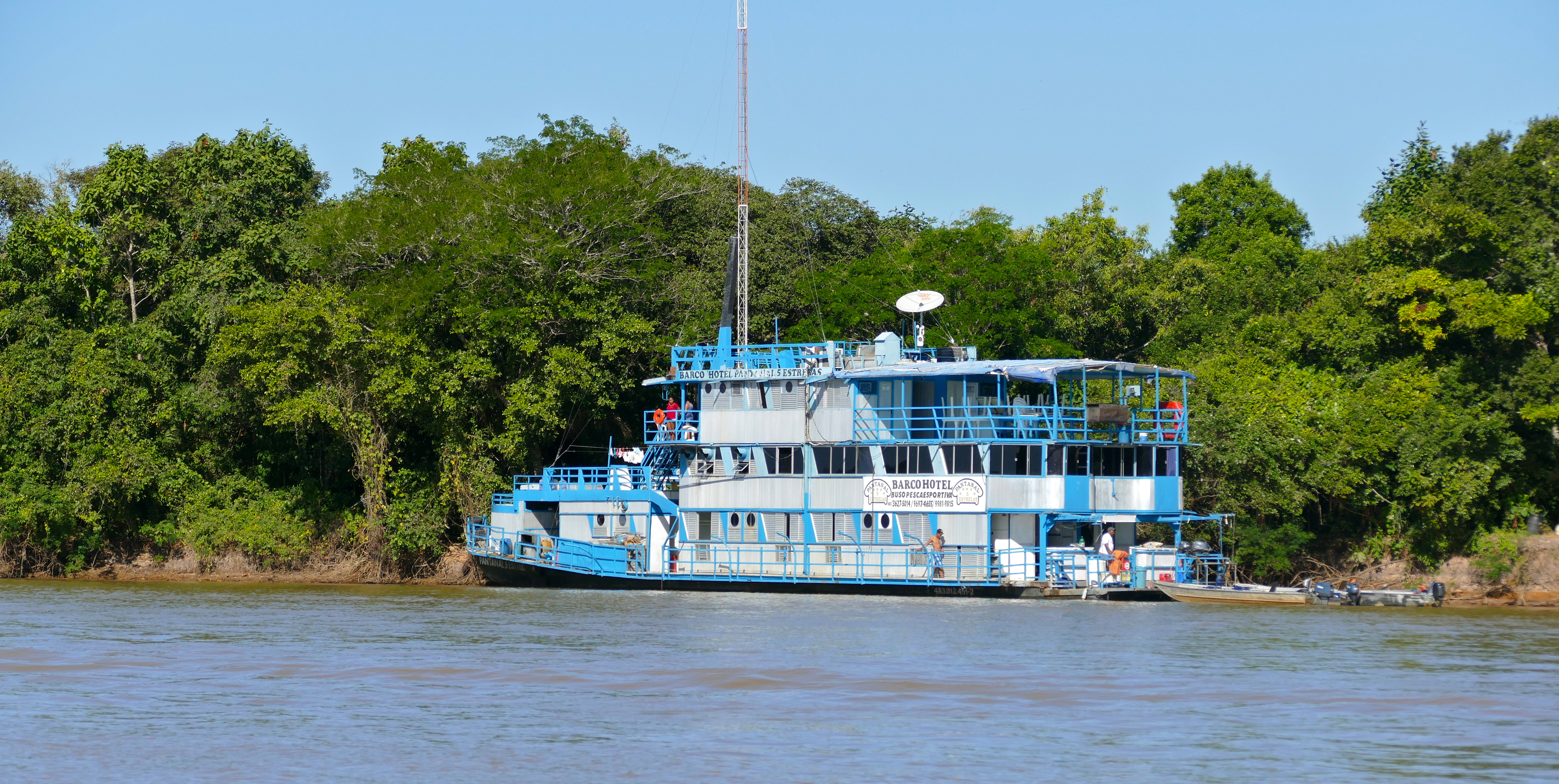 Rio São Lourenço, Porto Jofre, Pantanal, Poconé, Mato Grosso Brazil